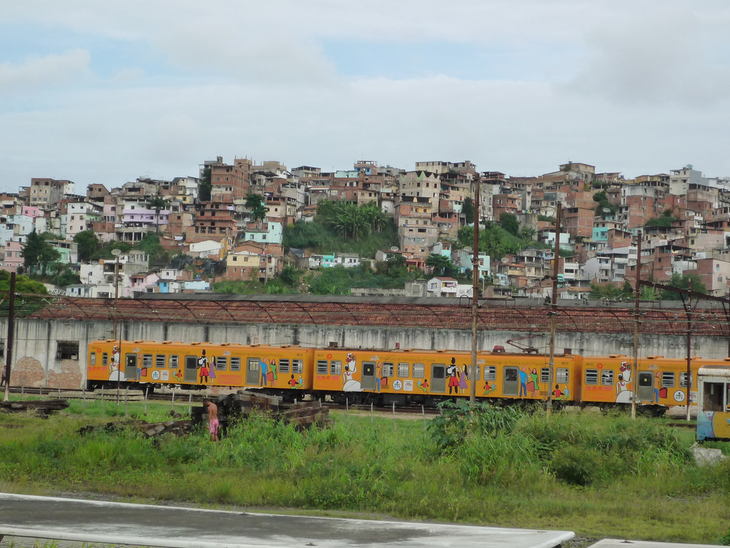 Trem no morro